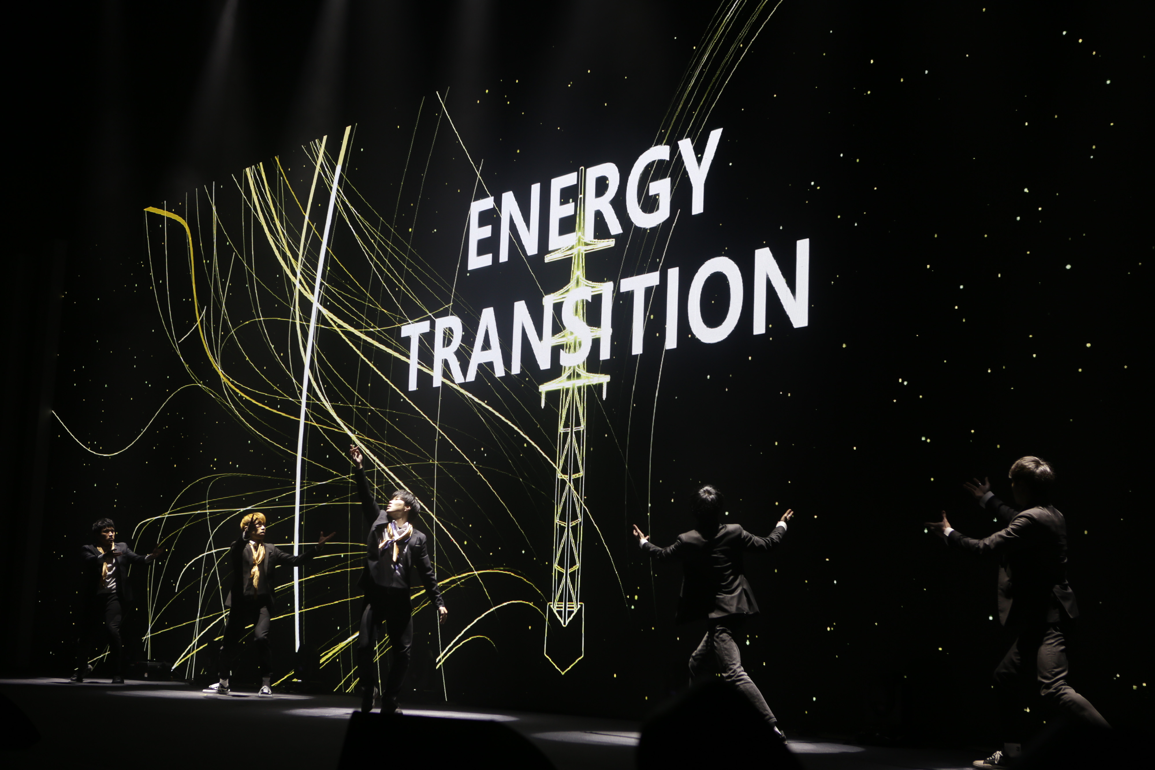 빅스포 개막식